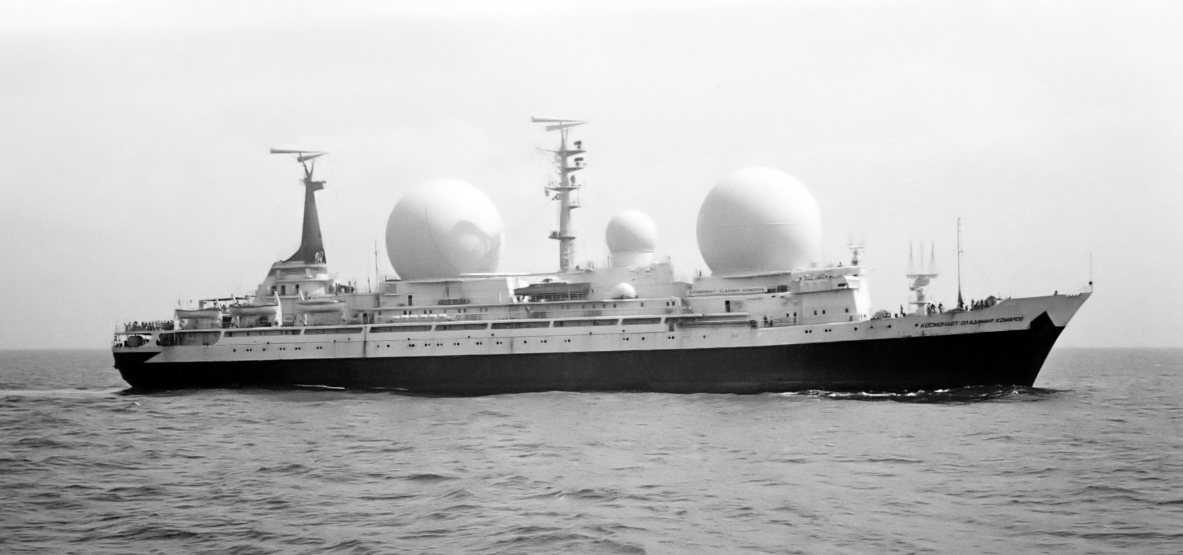 Научно-исследовательское судно СКИ ОМЭР АН СССР "Космонавт Владимир Комаров"